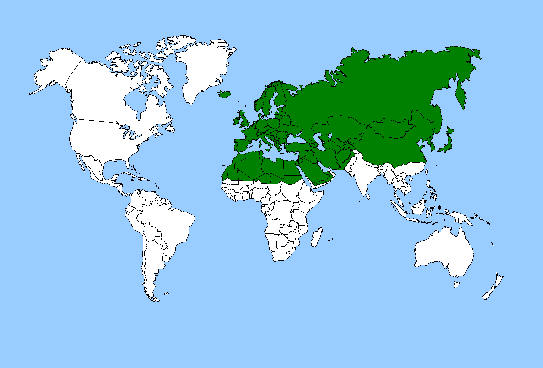 écozone palearctique